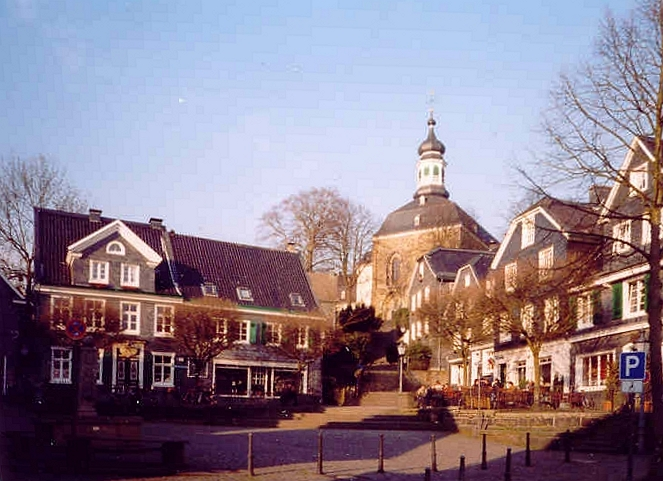 Der Marktplatz in Solingen-Gräfrath